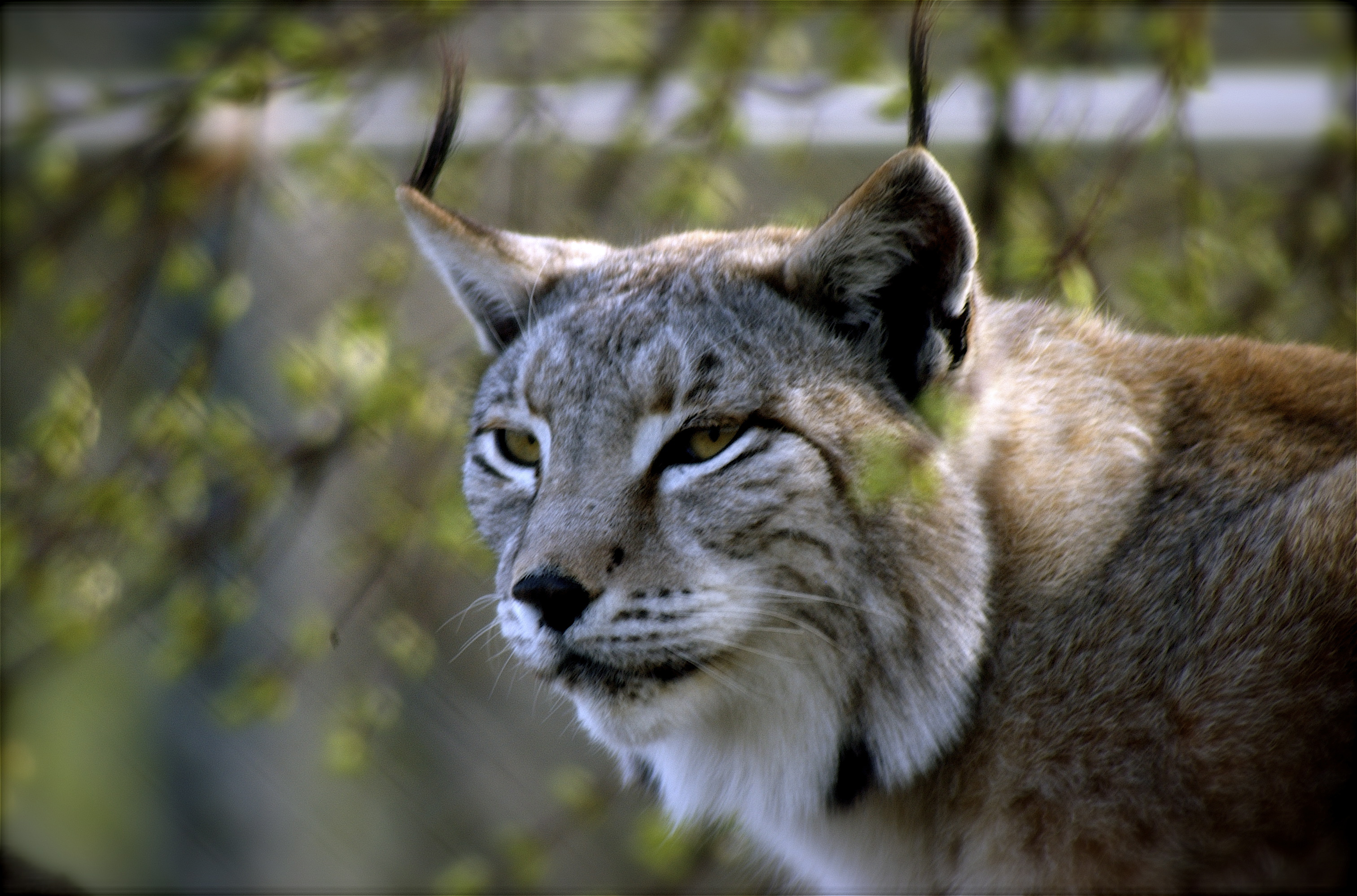 Lince boreal en el Centro de Naturaleza Cañada Real, en Peralejo (Madrid).